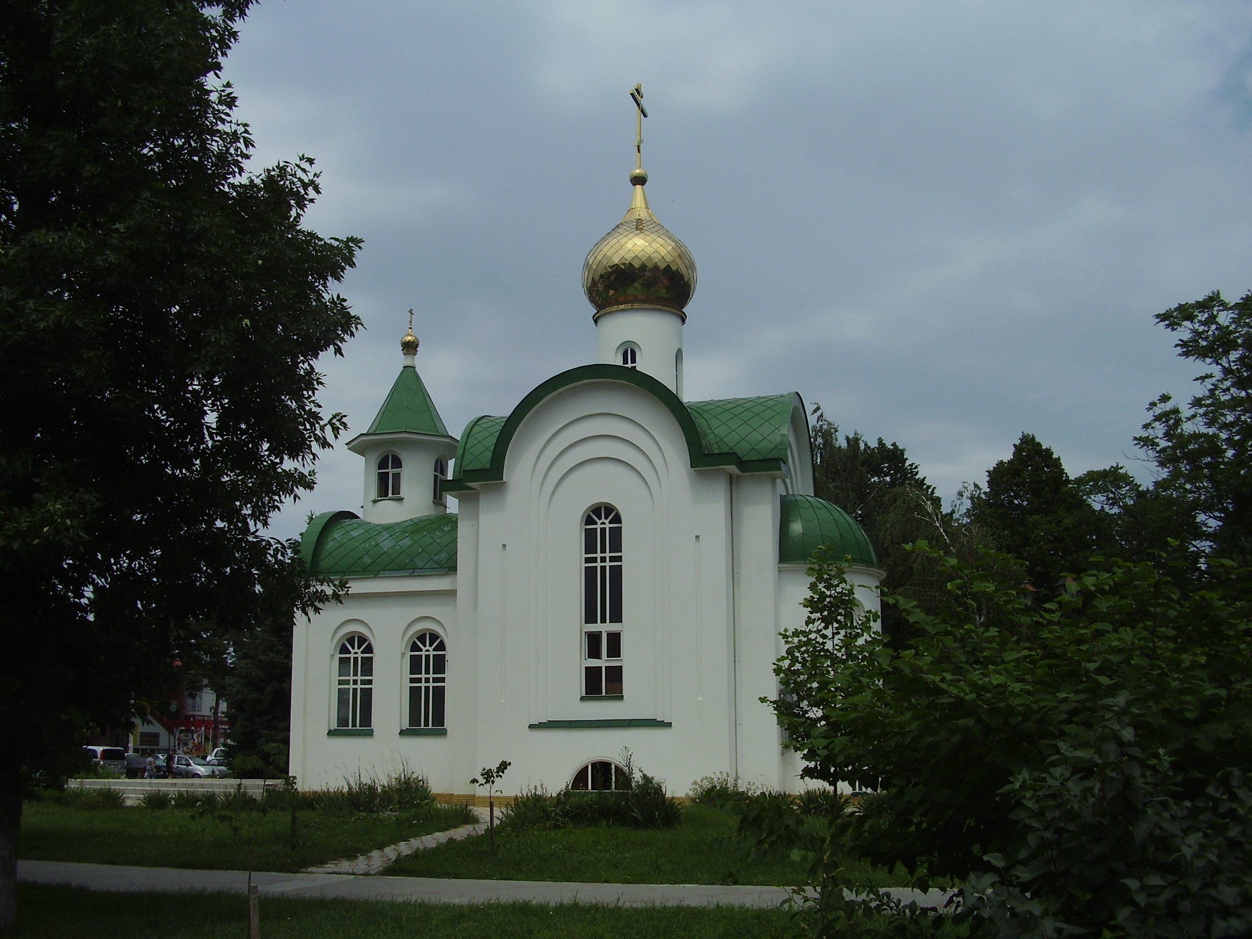 Церковь в Тимашёвске.